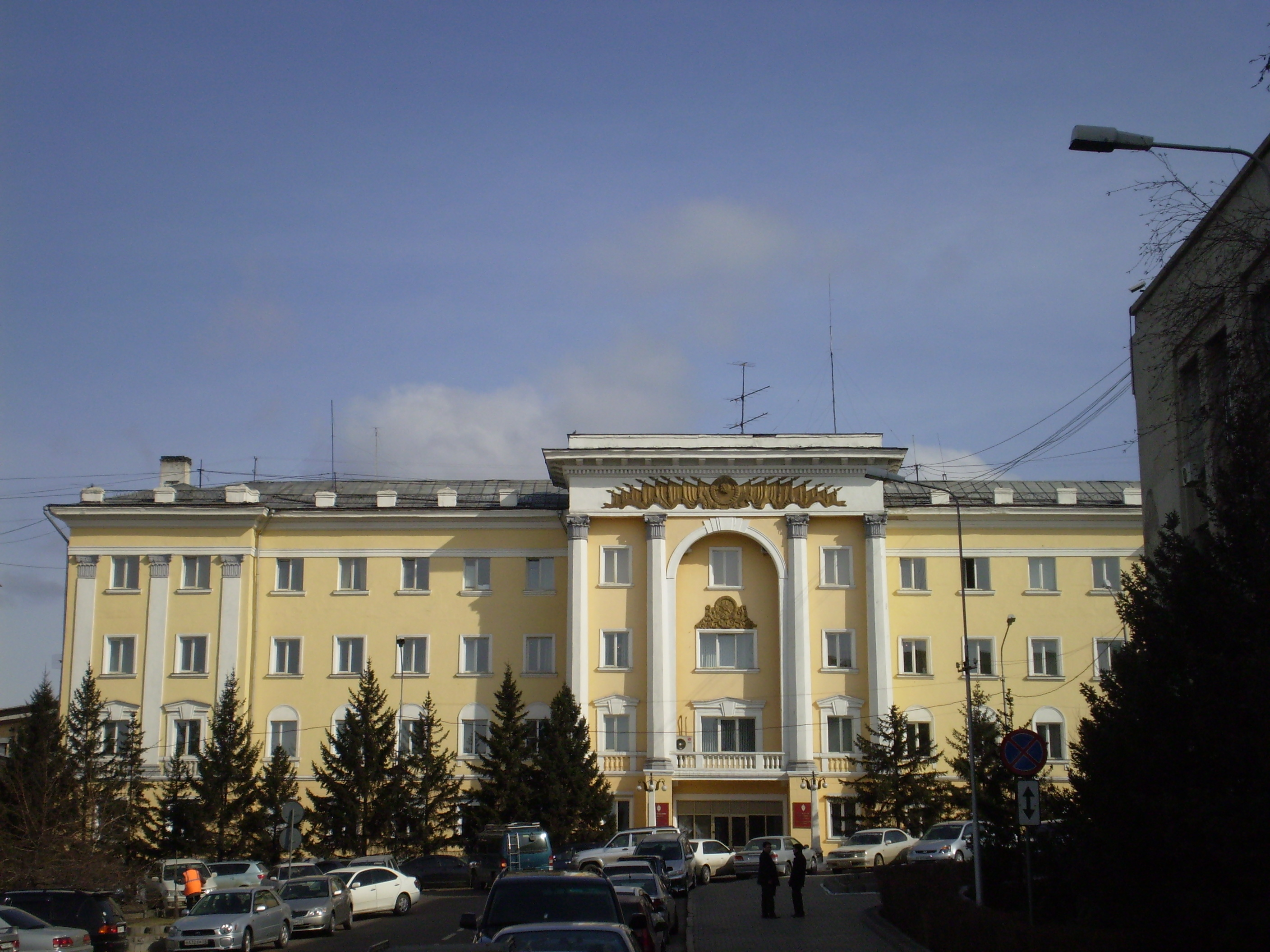 Здание Министерства внутренних дел. Архитектор Л. К. Минерт. 1950-е